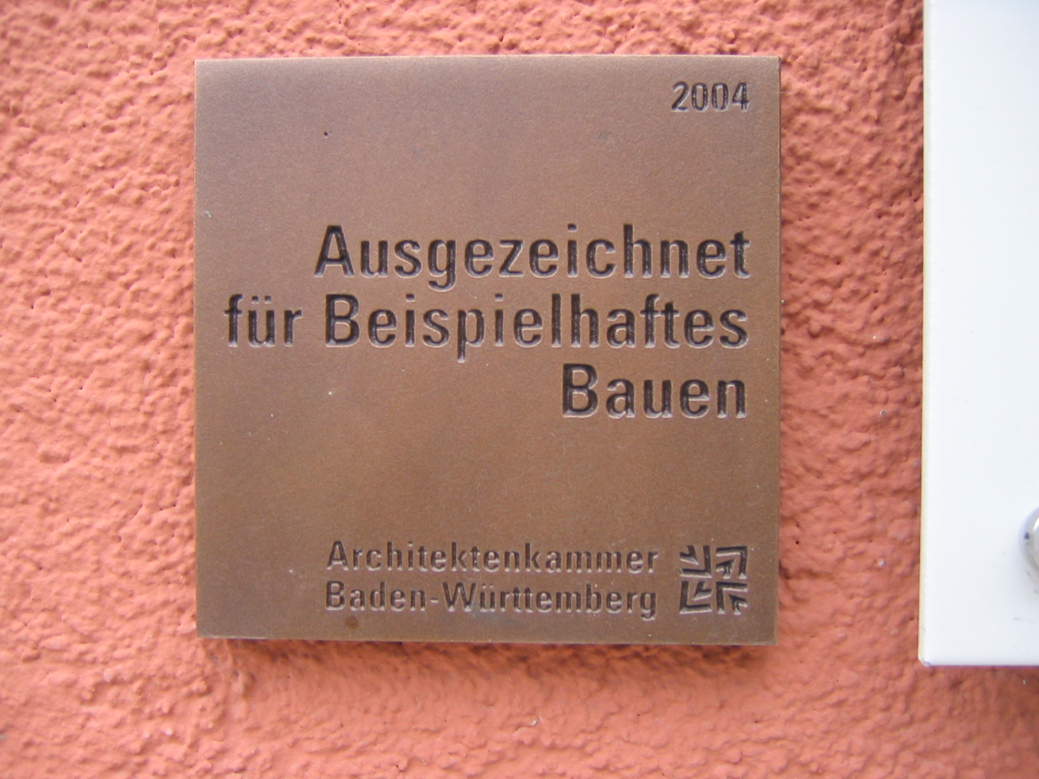 Sparkasse Donaueschingen wurde ausgezeichnet für "Beispielhaftes Bauen"